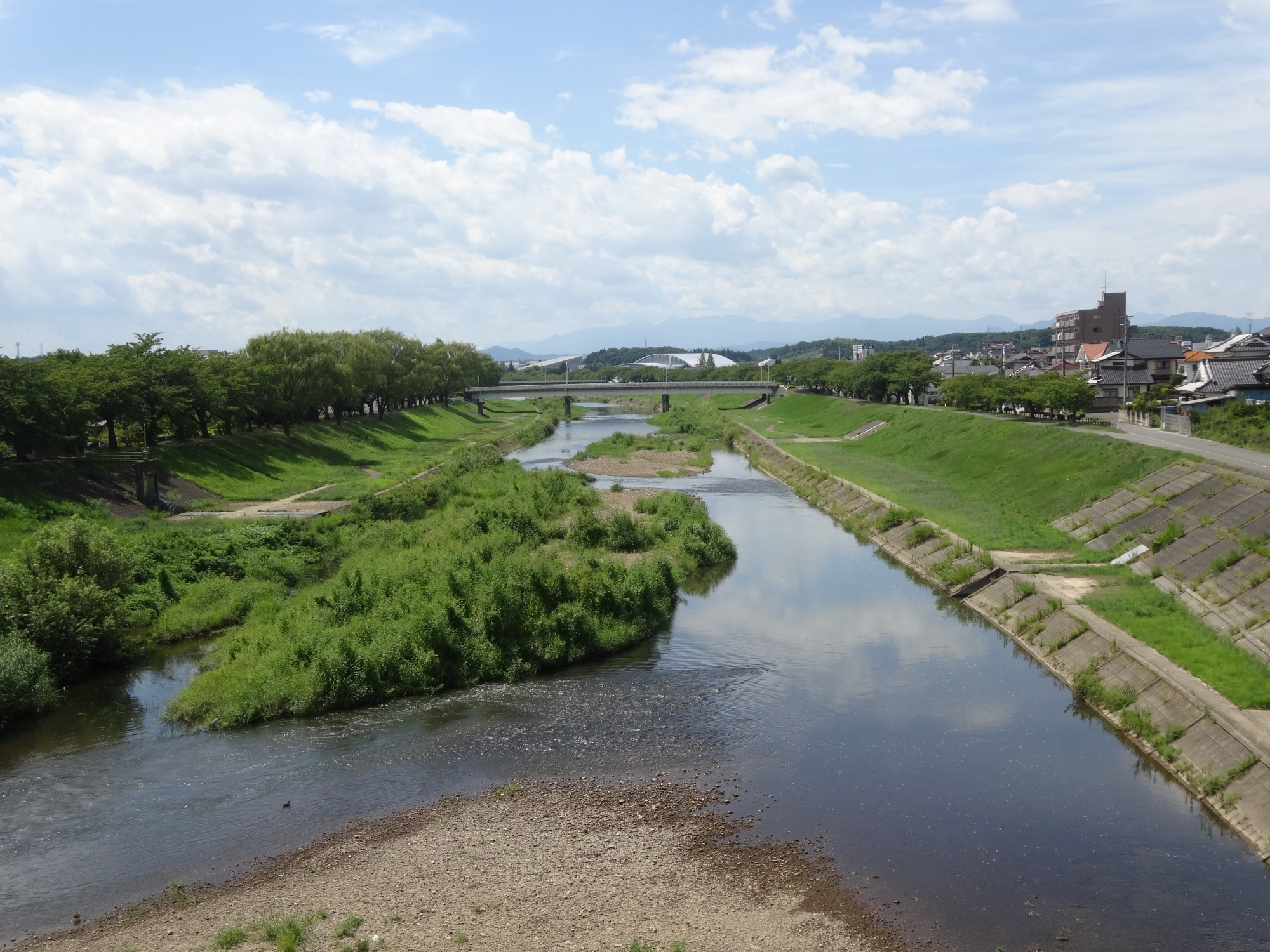 釈迦堂川（国道4号線、釈迦堂川橋より撮影）